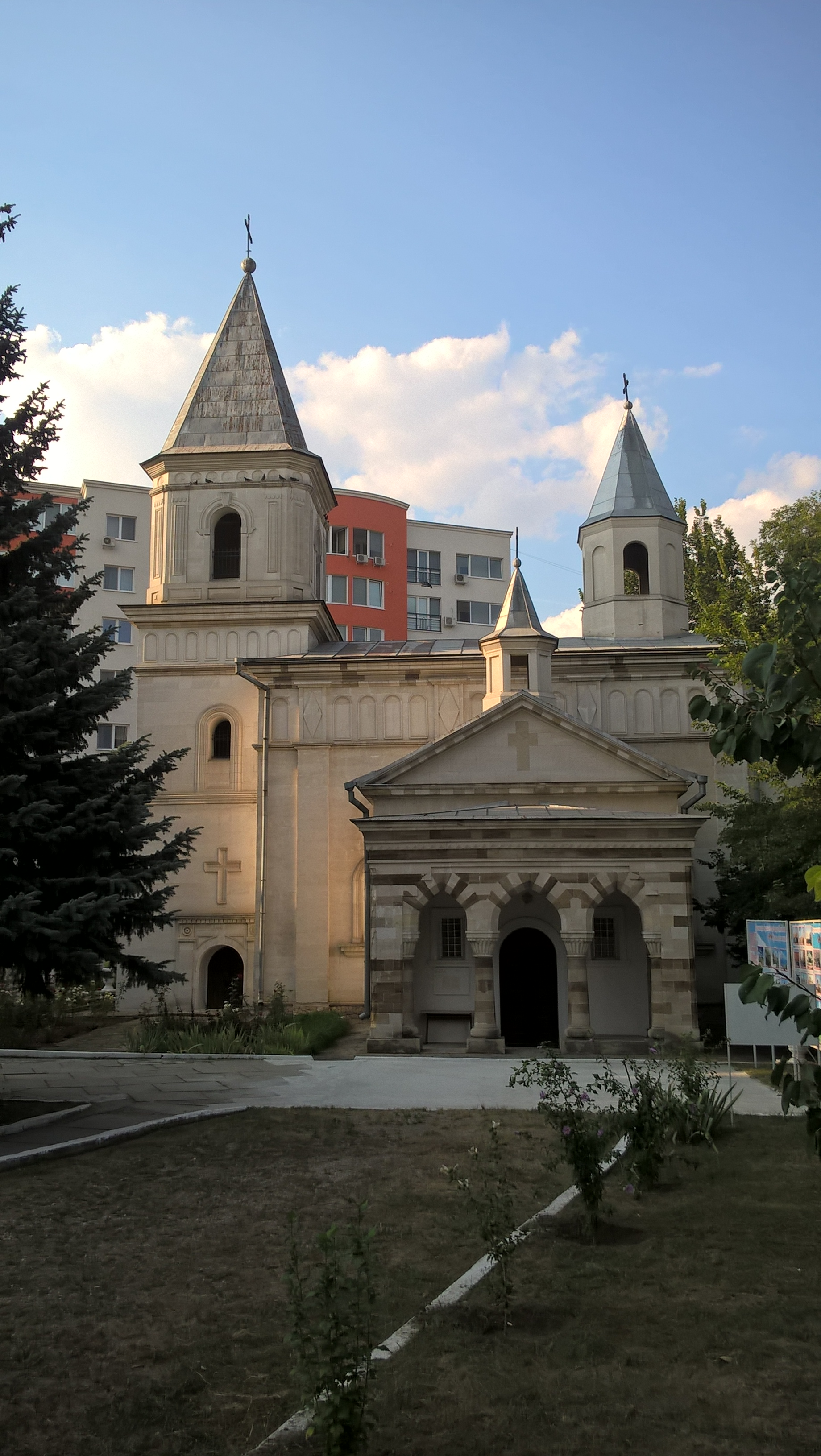 Kościół ormiański w Kiszyniowie